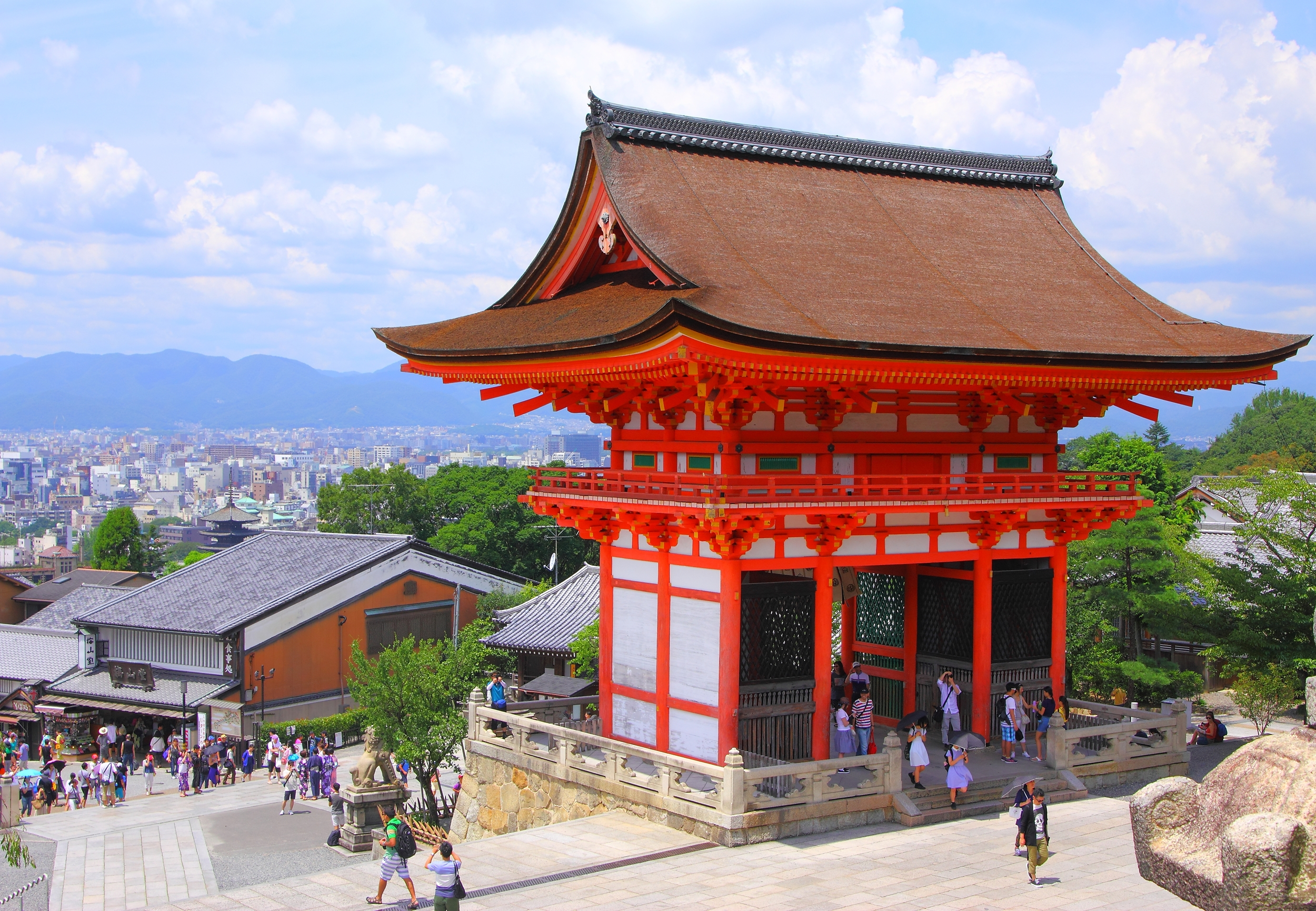 清水寺、仁王門（重要文化財）